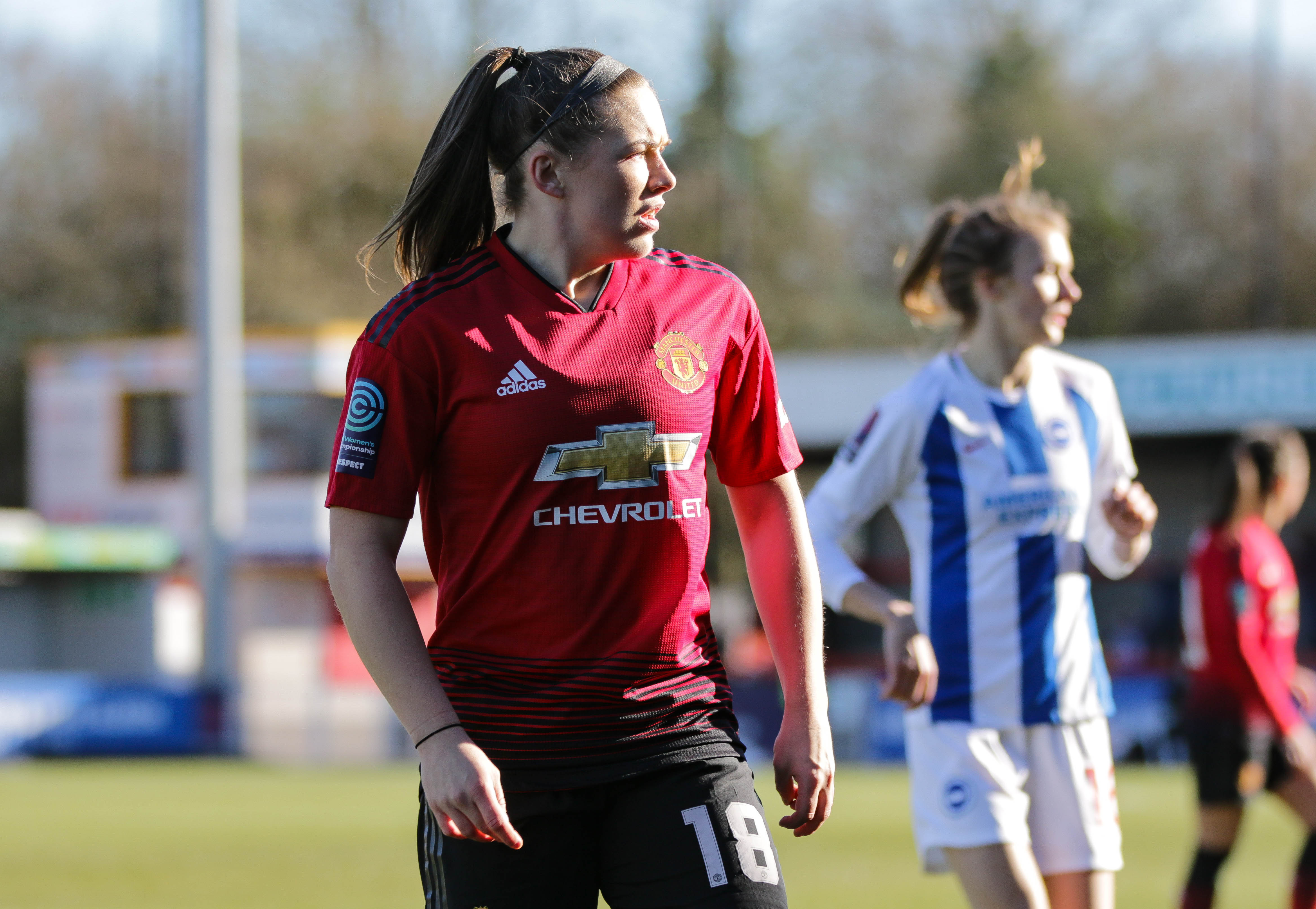 Kirsty Hanson